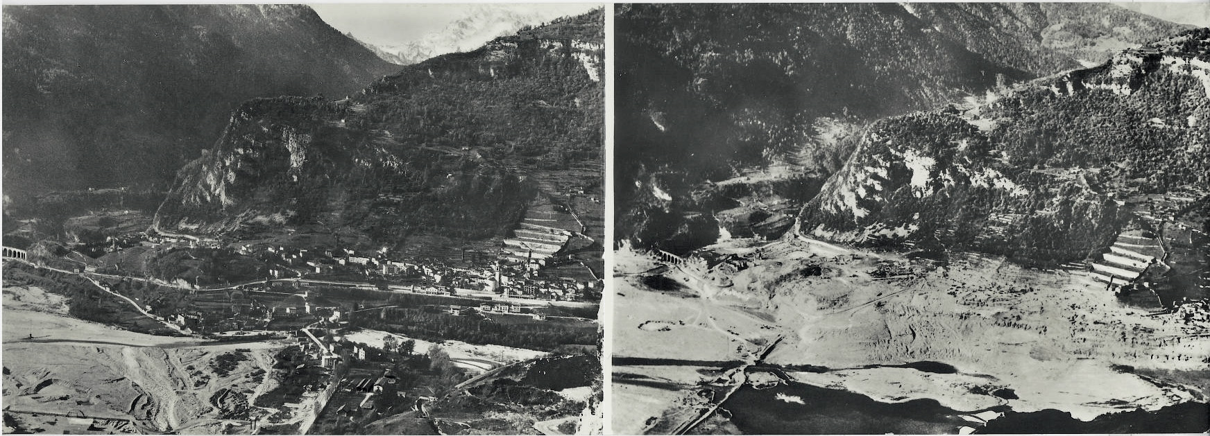 Longarone (BL) prima e dopo il diastro del Vajont del 1963.